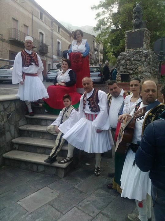 Gruppo folcloristico Shkëmbi - Associazione Culturale e Ricerca di Acquaformosa